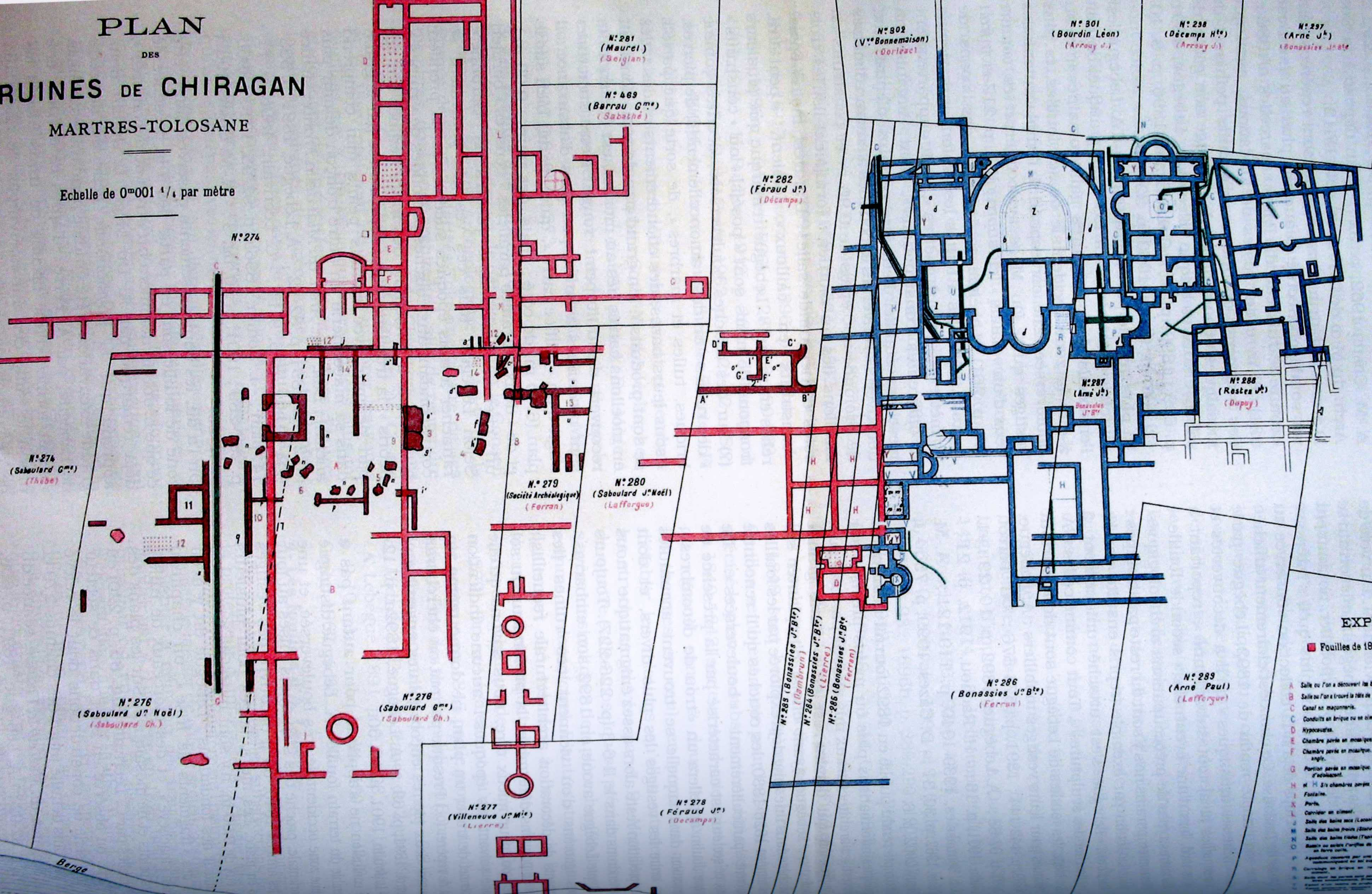 plan des fouilles de la villa de Chiragan